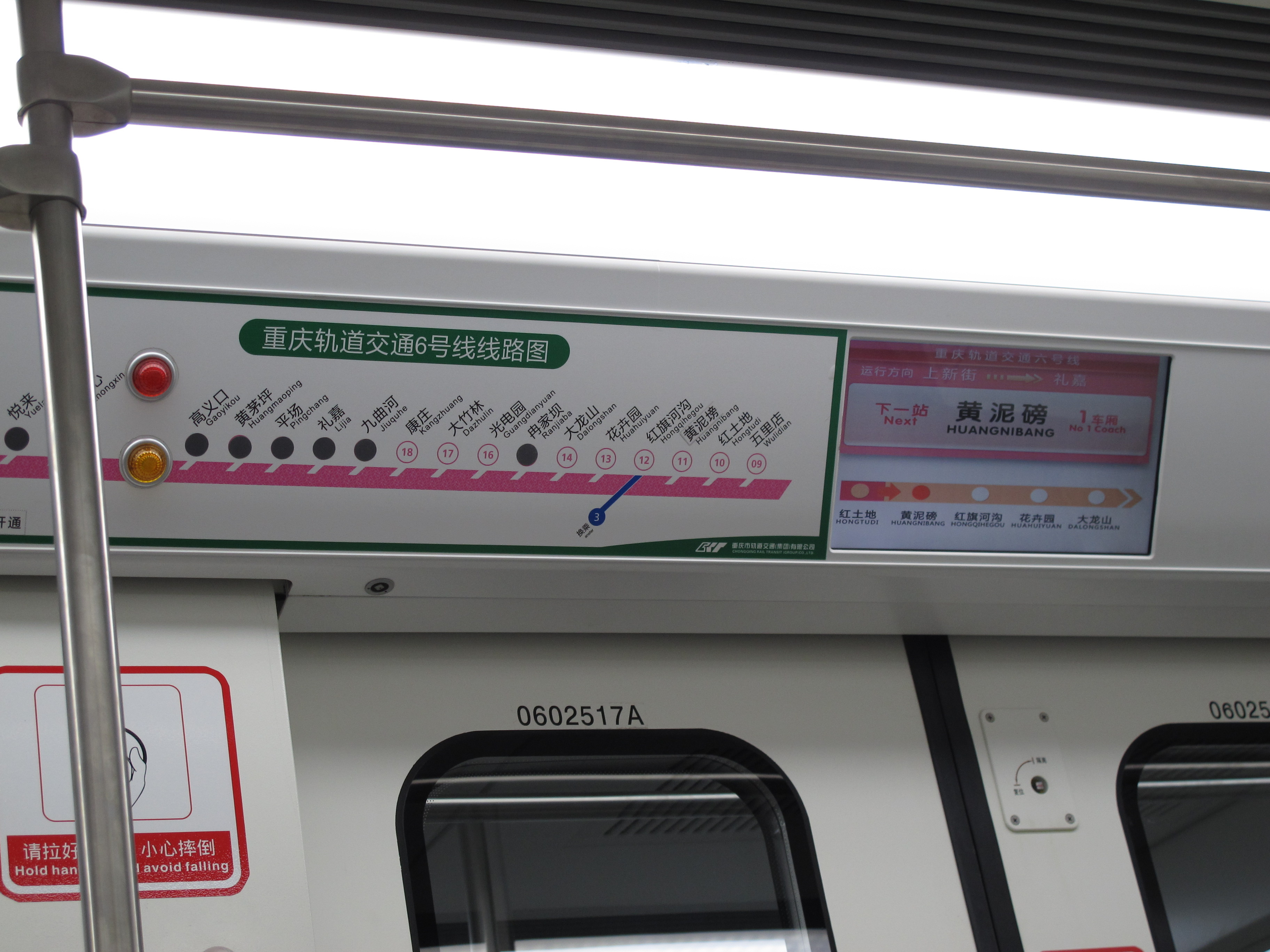 重庆轨道交通六号线在试运营期间的路线图及报站显示屏